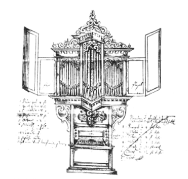 Drawing Georg Henrich Wagner: Organ in Hungen, District Gießen, Hesse, Germany